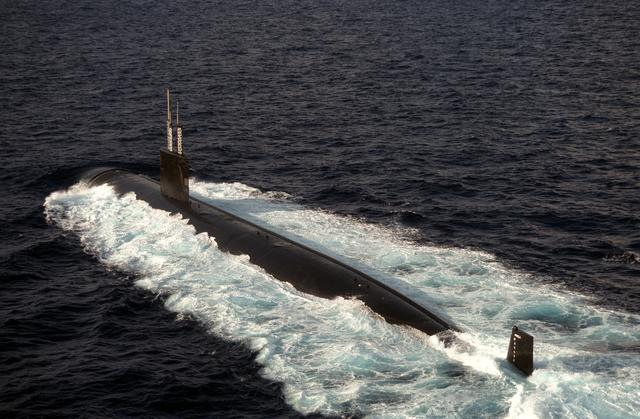 USS Alexandria (SSN-757)